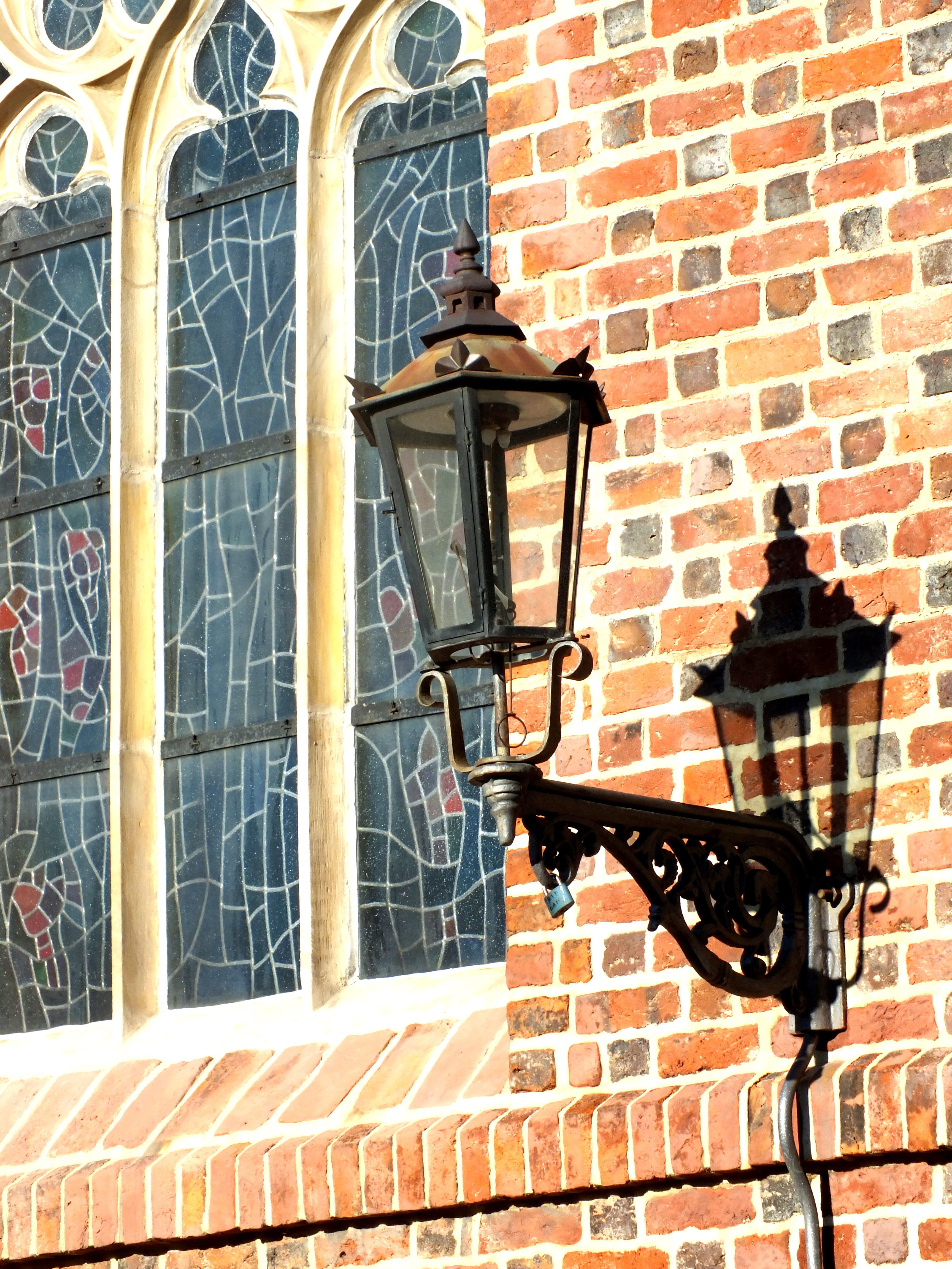 Wrocław, lampa gazowa na ewlewacji kościoła św. Piotra i św. Pawła